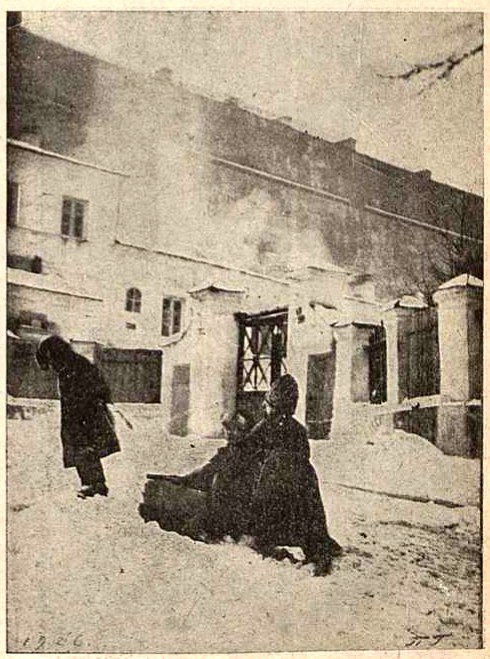 Беларуская (тарашкевіца): Менск (Miensk), Валокі Полацкія (Vałoki Połackija): вуліца Валоцкая (vulica Vałockaja), сядзіба Ваньковічаў (Vańkovič)